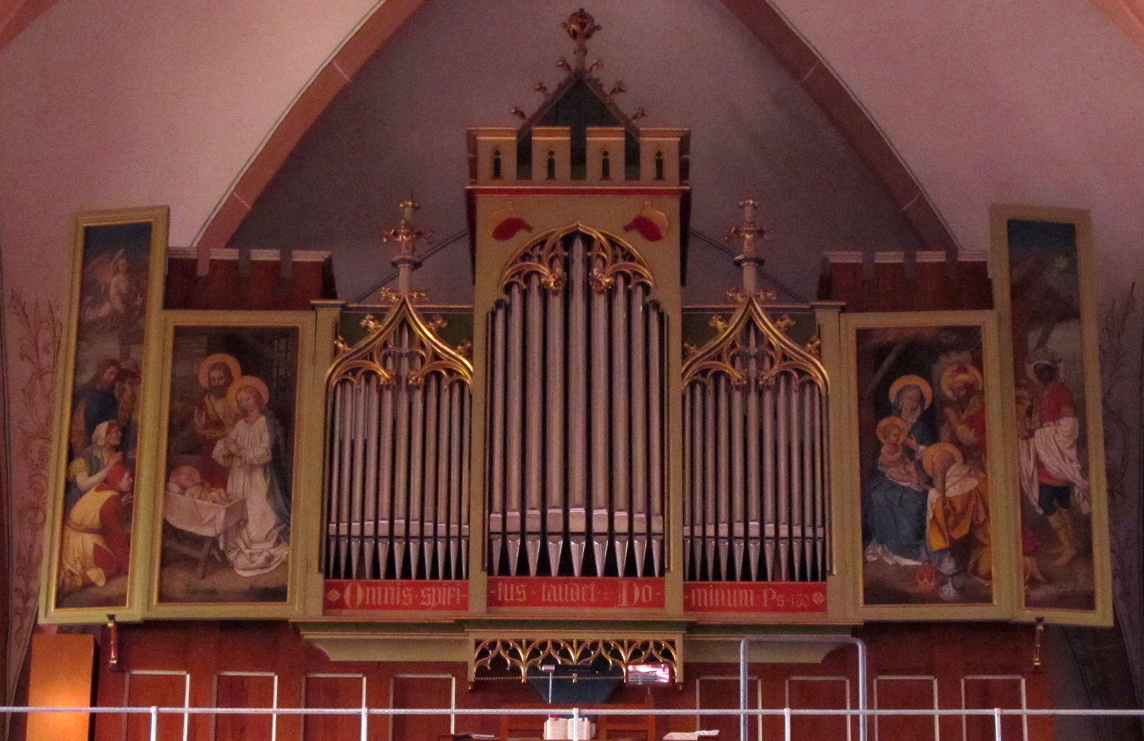 Orgelprospekt der katholischen Pfarrkirche St. Michael in Wemmetsweiler, Gemeinde Merchweiler, Saarland